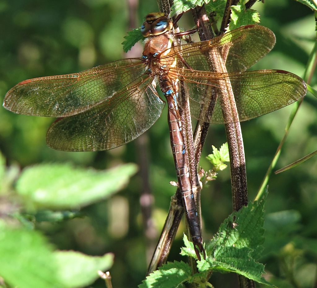 Beschreibung: Braune Mosaikjungfer (Aeshna grandis) Fotograf: Darkone, 18. August 2005